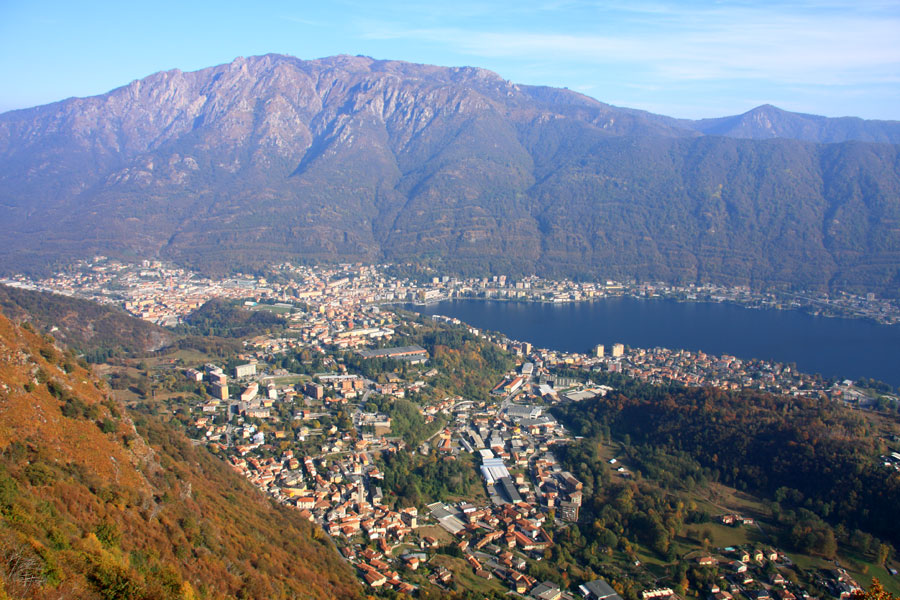 Panorama di Omegna (VB) con il massiccio del Monte Mottarone dal belvedere di Quarna Sopra.